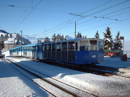 Arth-Rigi-Bahn (Zahnradbahn)